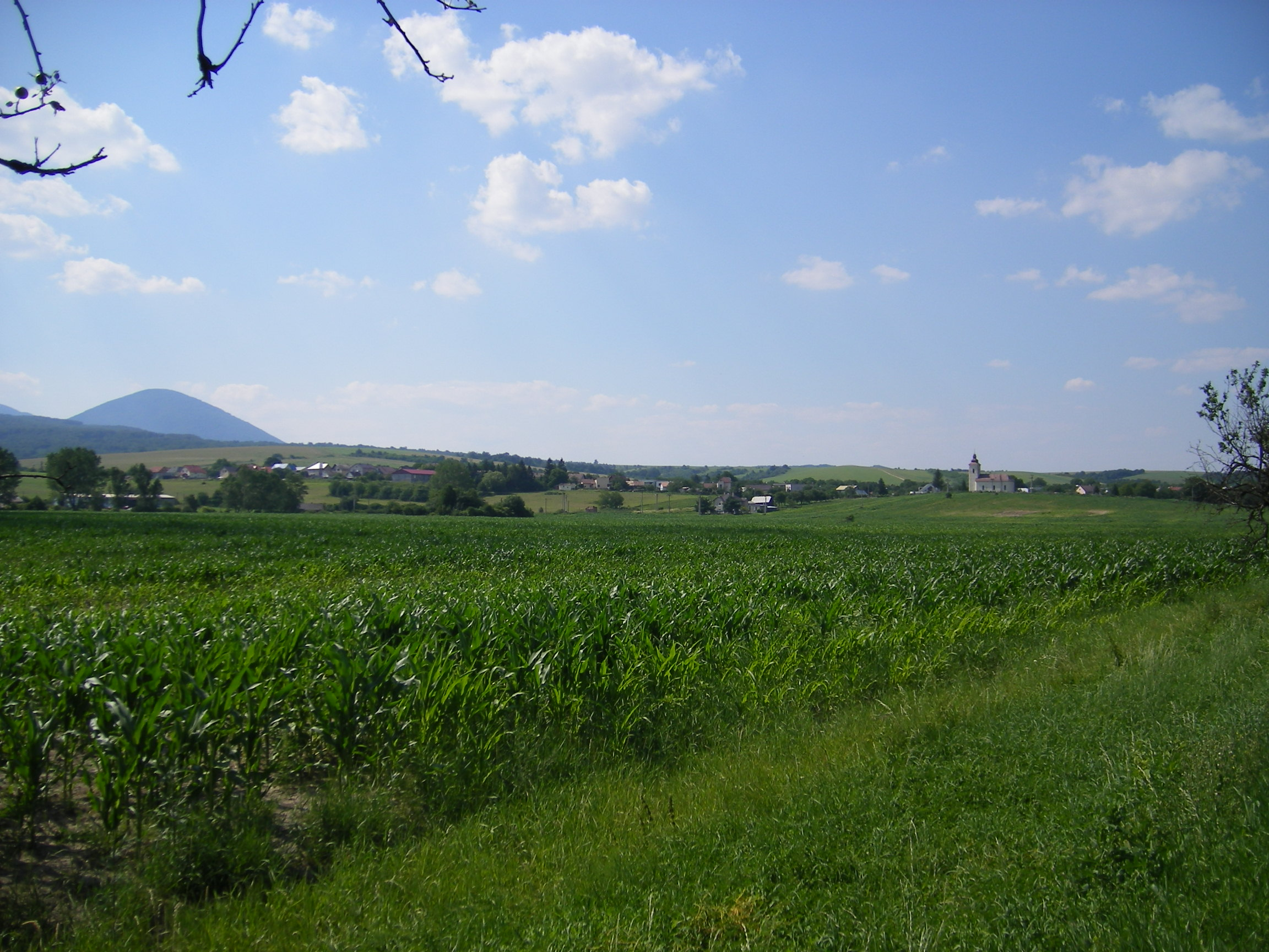 Hlinné (okres Vranov nad Topľou)